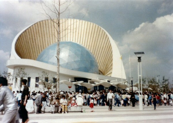 科学万博